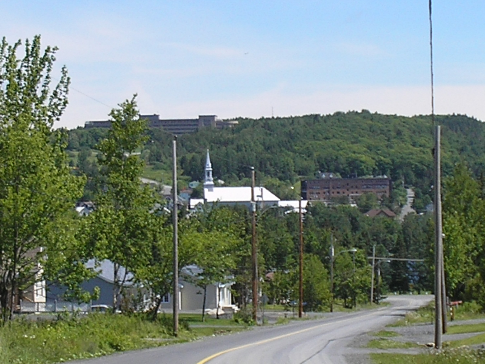 Lac-Etchemin. Lac-Etchemin est une municipalité de la région touristique des Etchemins résultant de la fusion, le 10 octobre 2001, de Lac-Etchemin et de Sainte-Germaine-du-Lac-Etchemin. Elle est située au cœur de la région administrative Chaudière-Appalaches dans le sud du Québec.